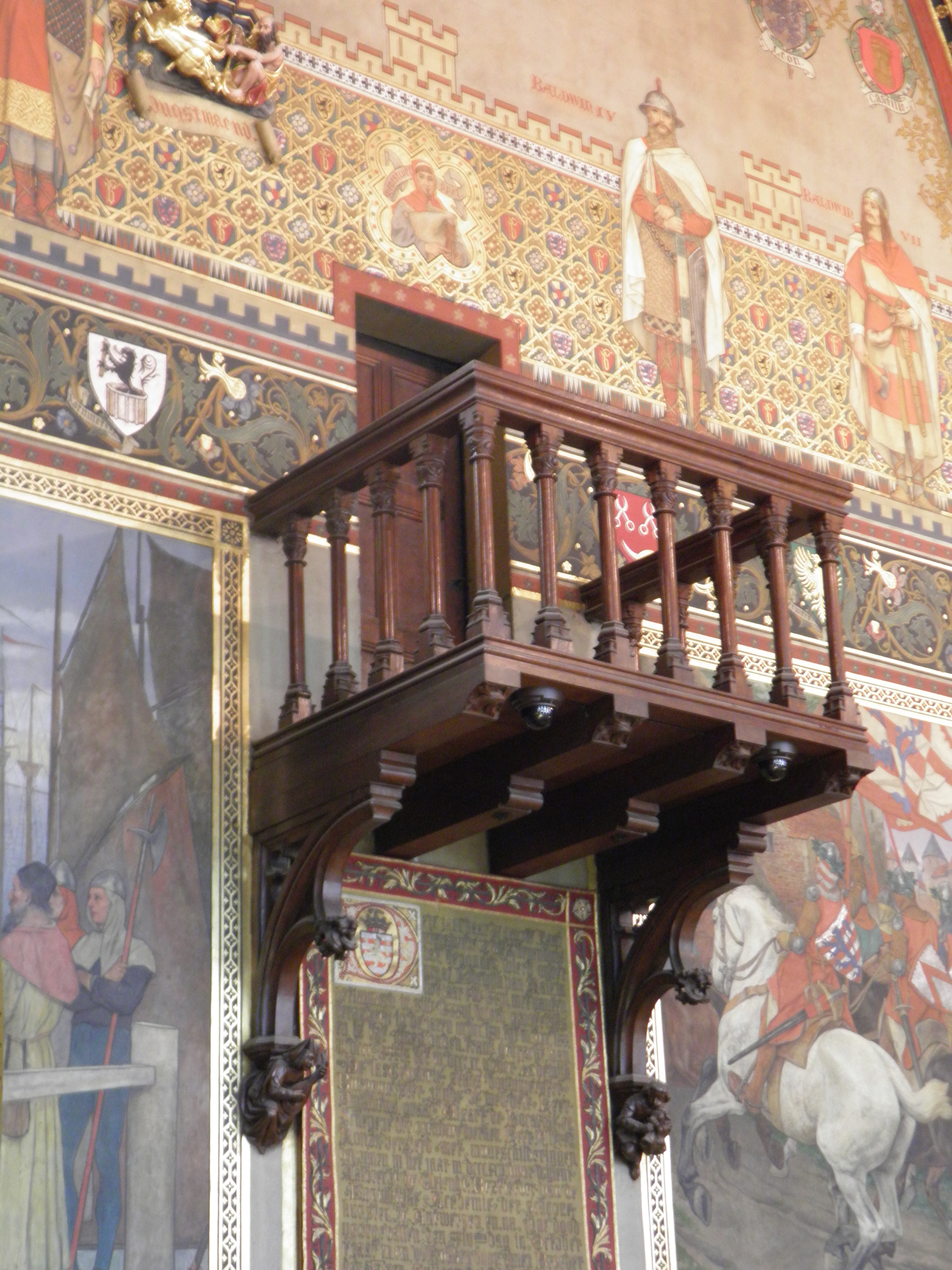 Minnesaengerbalkon